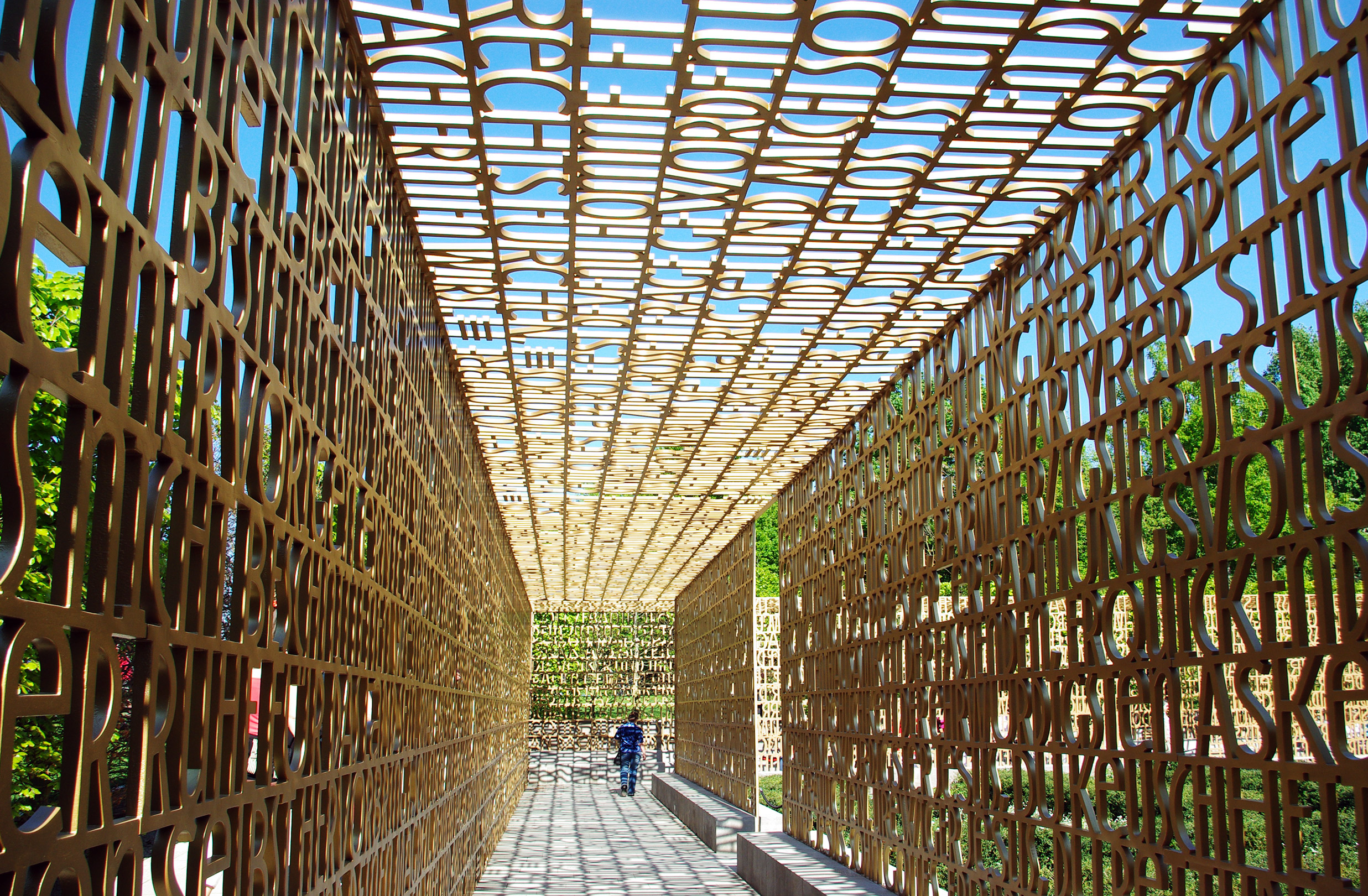 Teil des an einen christlichen Kreuzgang angelehnten Wandelganges des "Christlichen Gartens" in Berlin (Marzahn), aufgenommen im Mai 2011.